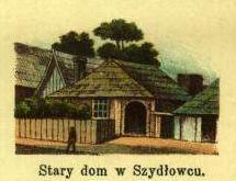 rysunek jednego z domów w Szydłowcu typowej architektury regionu.